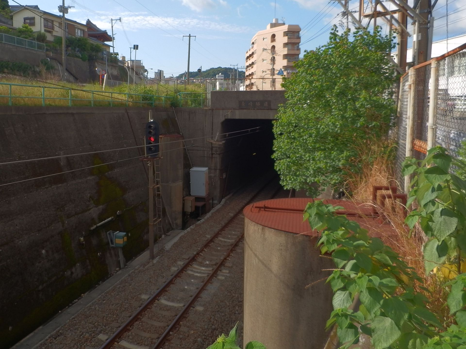 JR長崎本線の長崎トンネル。長崎側坑口。金網の隙間から撮影。